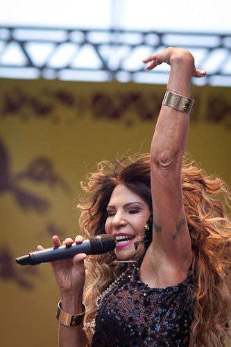 Elba Ramalho canta em homenagem a Luiz Gonzaga em palco montado no Vale do Anhangabau, SÃO PAULO, SP, BRASIL.